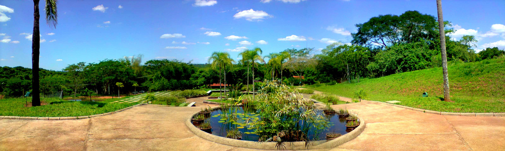 Jardim Botânico de Bauru, São Paulo, Brasil.